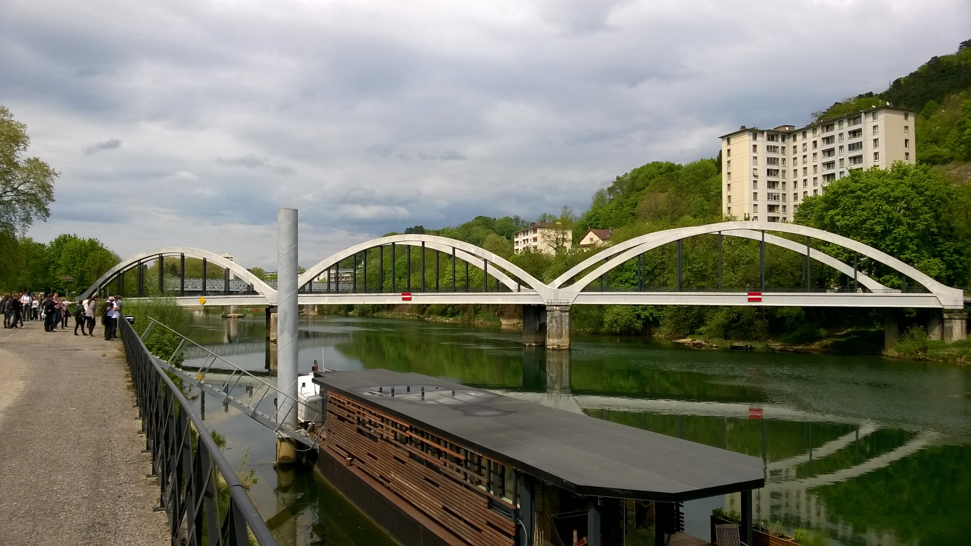 Pont de Chardonnet in Besançon.